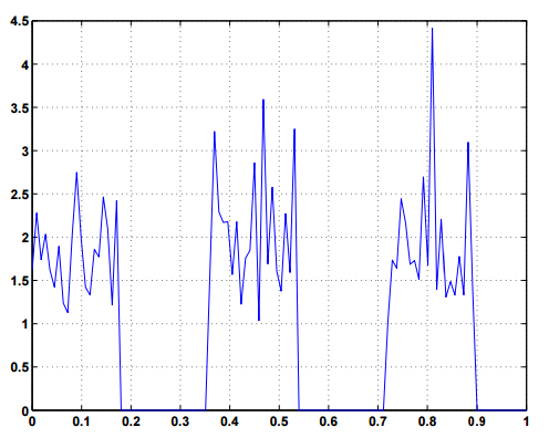 Plot de função periódica não harmônica